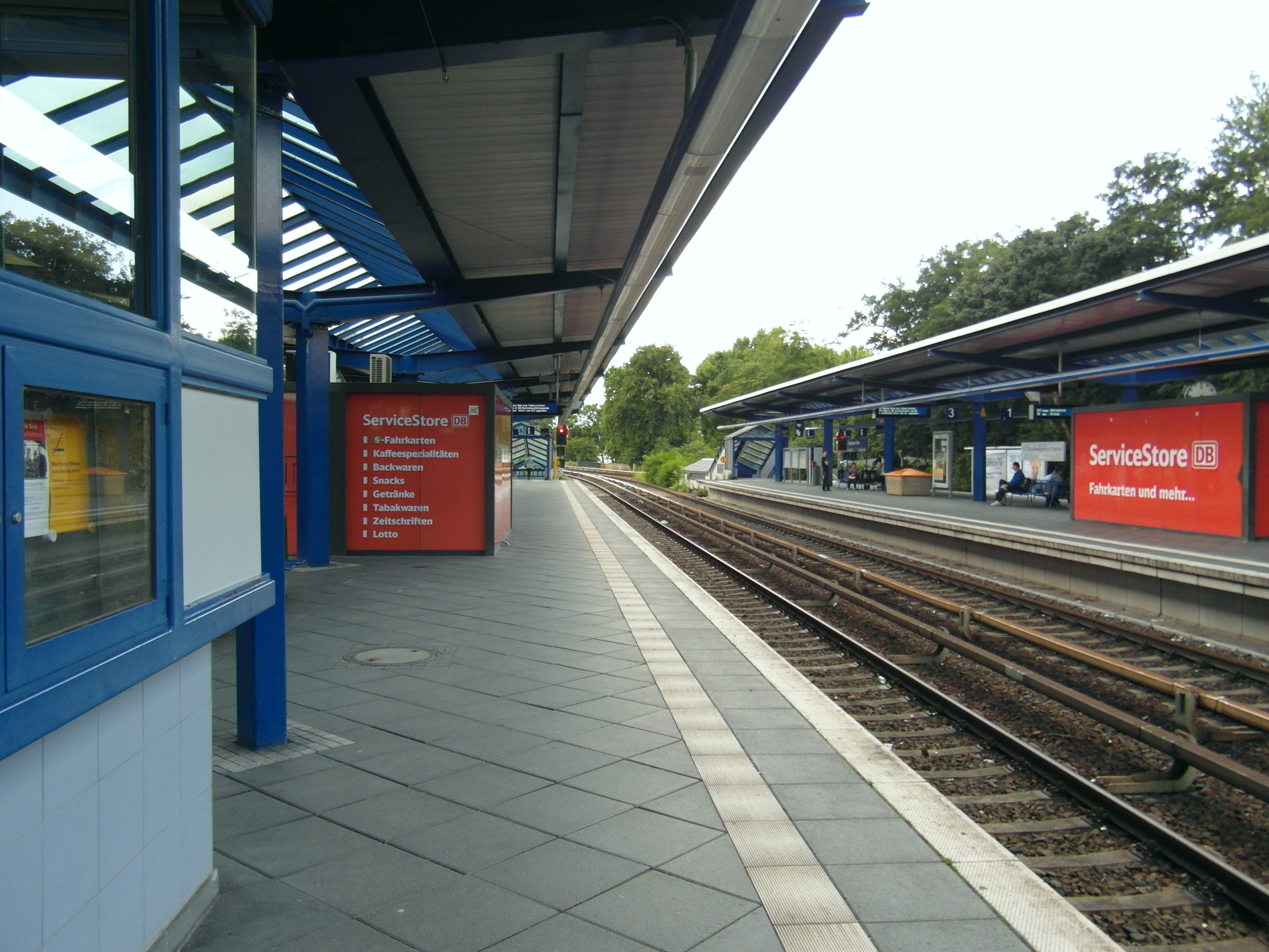 Ringbahn - Linien S41, S42, S8, S9 und S85 (in der Theorie)